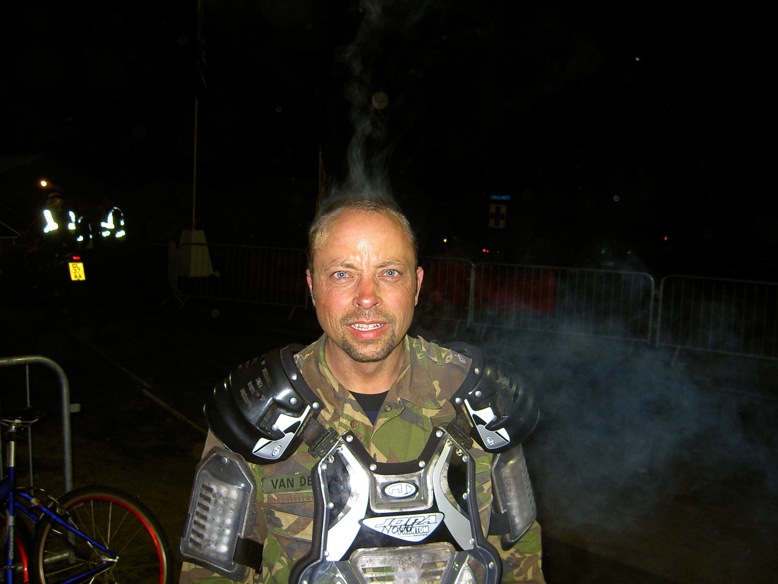 Militaire endurorijder met bodyprotector. Van het harnas ga je niet zweten, van enduro rijden wel.